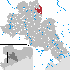 Mochau in Saxony - district Mittelsachsen